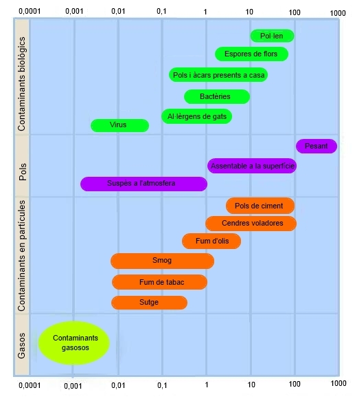 Diagrama que mostra una classificació de l'aerosol atmosfèric segons el seu diàmetre en micròmetres